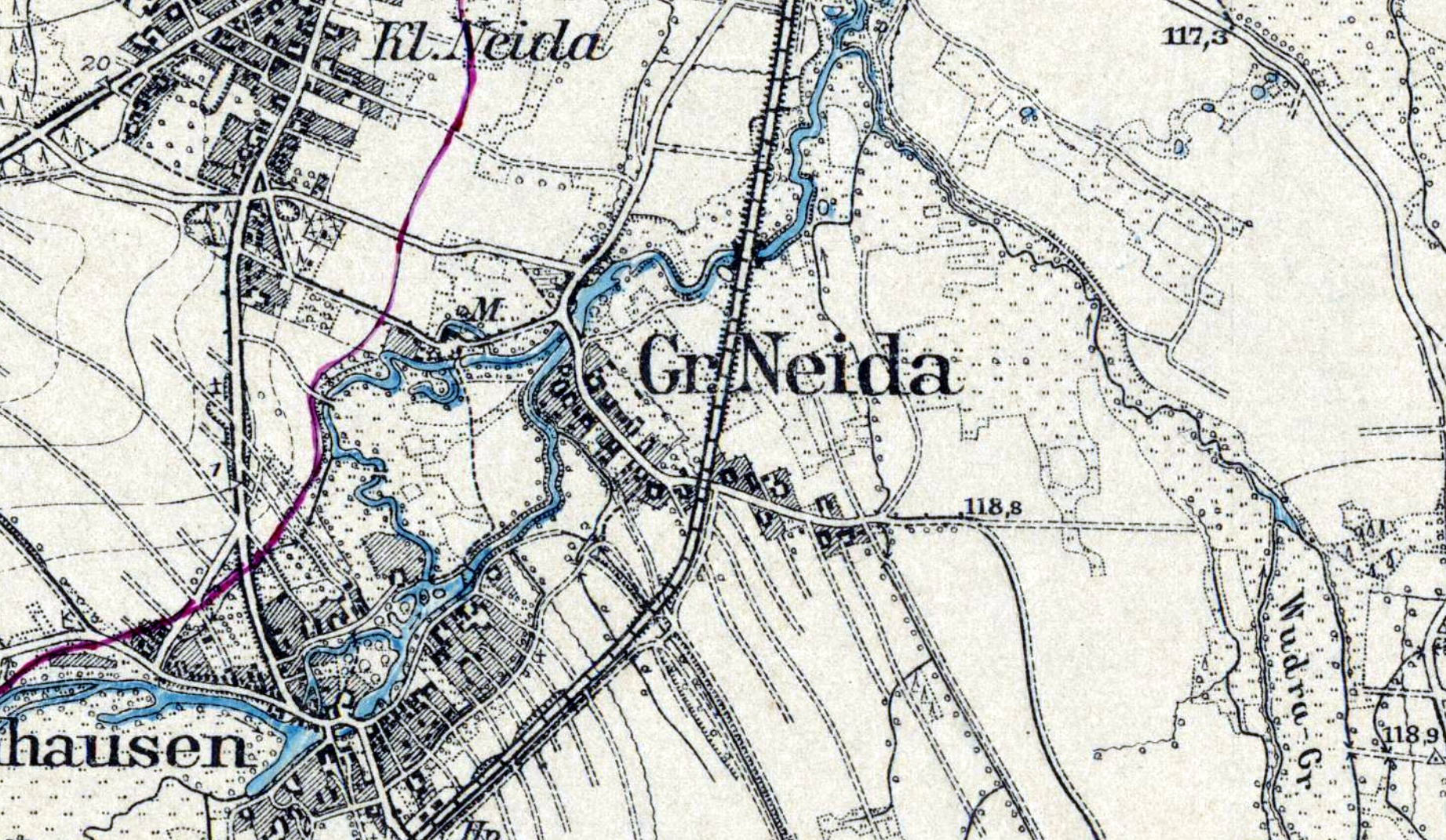 Der Ort Groß Neida bei Hoyerswerda auf dem Messtischblatt von 1920. Hornjoserbsce: Wulka Nydej pola Wojerec na hamtskej karće z lěta 1920.